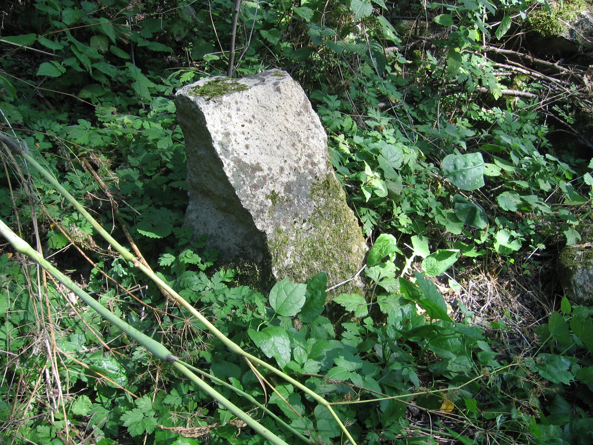 Част от руйните на късно средновековната църква про оброка Св. Георги в с. Берайнци